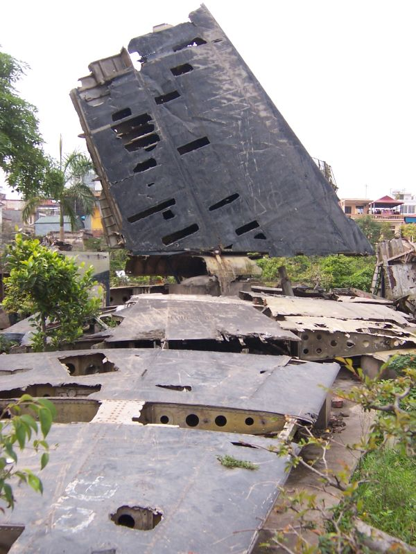 A B52 debris from B52 Museum, Hanoi, Vietnam